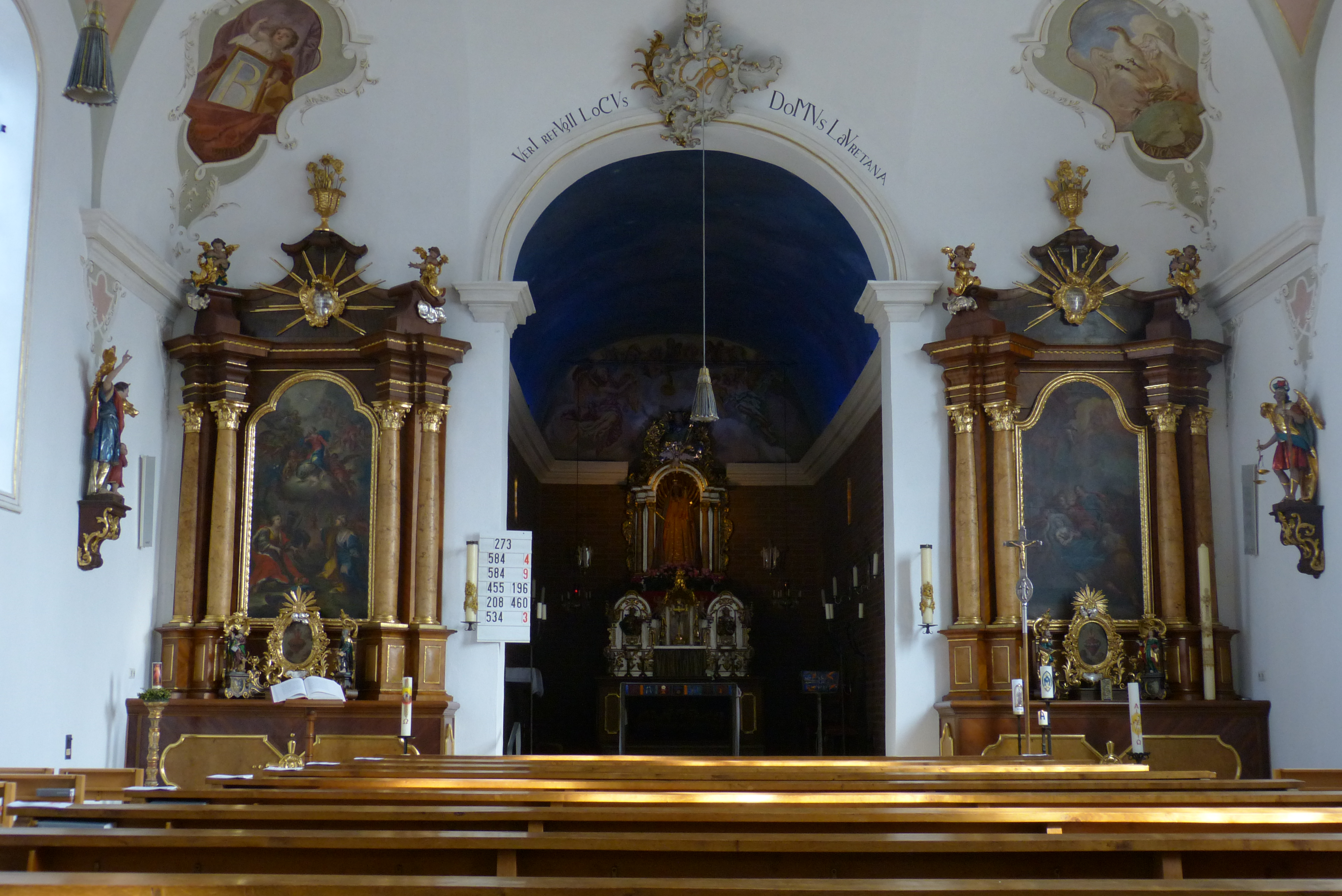 Altäre in der Wallfahrtskirche St. Maria von Loreto auf dem Kobel in Westheim (Neusäß). In der Mitte die "Gnadenkapelle".